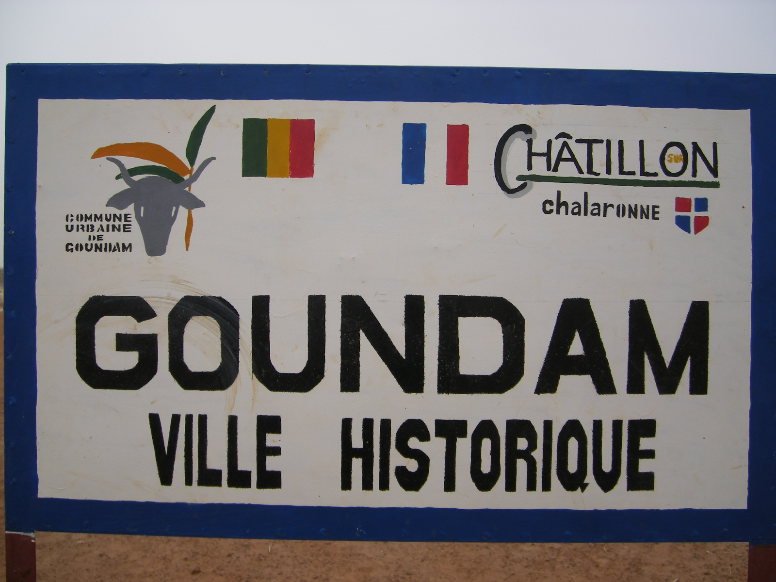 Goundam_Ortsschild.jpg